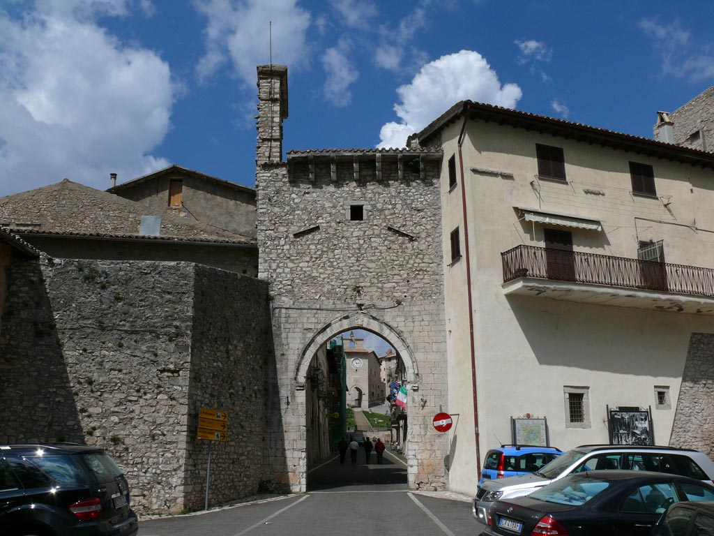 Porta Spoletina